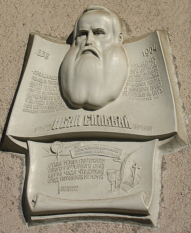 Памятная доска Ивану Антоновичу Сильвай-Сливке (укр. Іван Антонович Сильвай, литературный псевдоним — Уриил Метеор, 1838 — 1904) — карпаторусскому поэту и писателю, священнику в Сваляве.